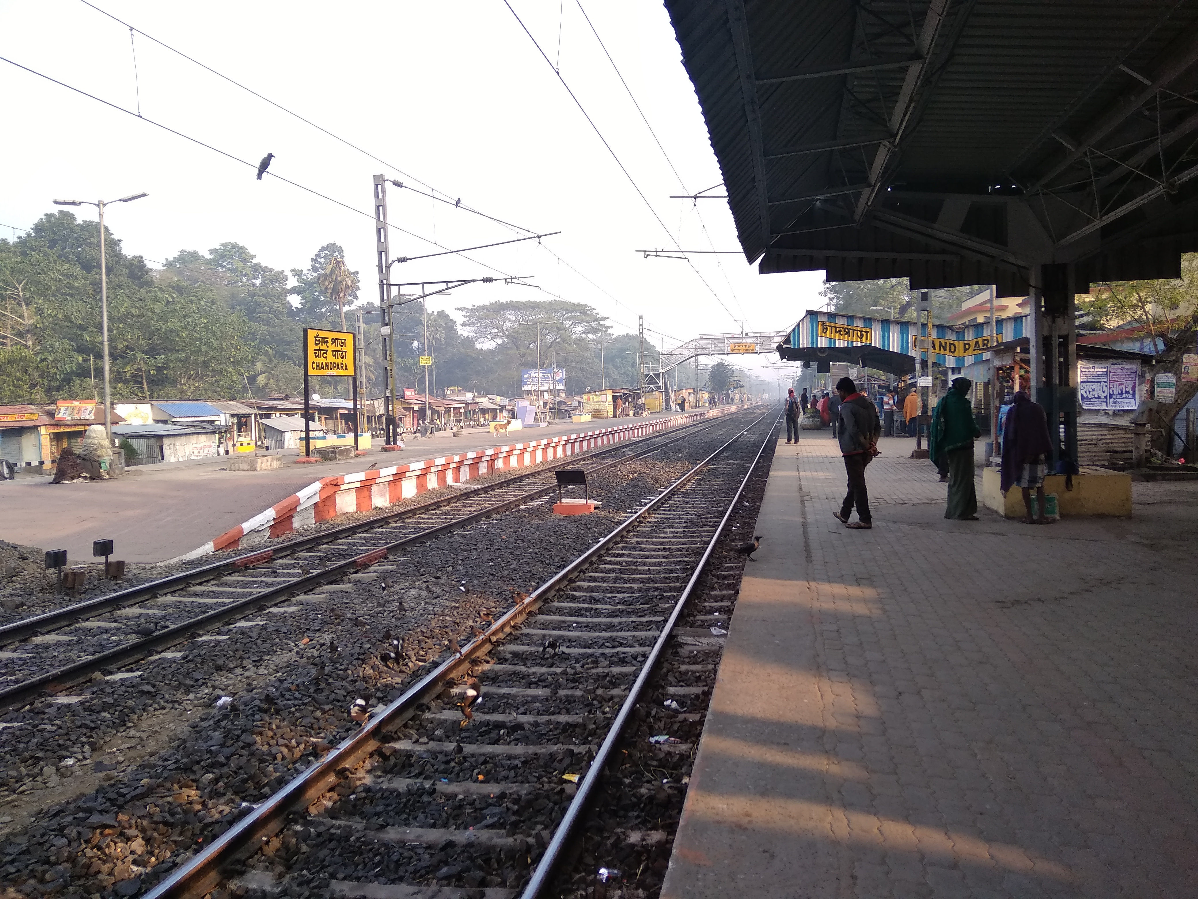 চাঁদপাড়া রেলওয়ে স্টেশনের ১ ও ২ নং প্ল্যাটফর্ম।